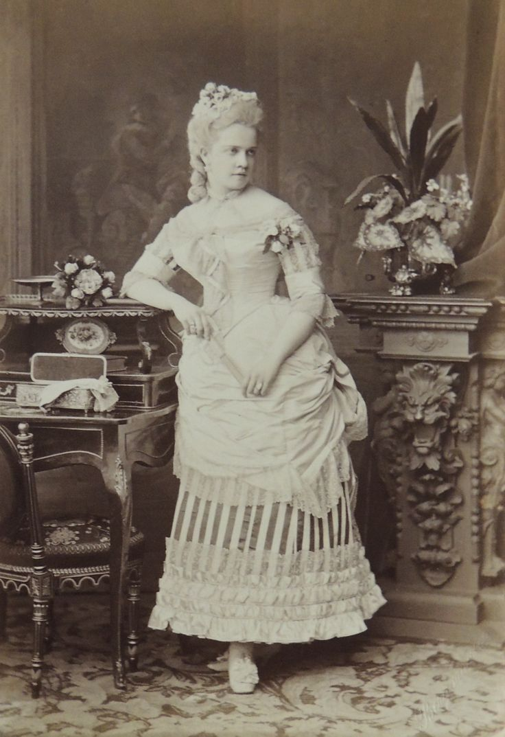 Баронесса Дарья Владимировна Фредерикс, урождённая княжна Трубецкая (1851—1916), с 1879 года жена барона Владимира Александровича Фредерикса (1837—1892).